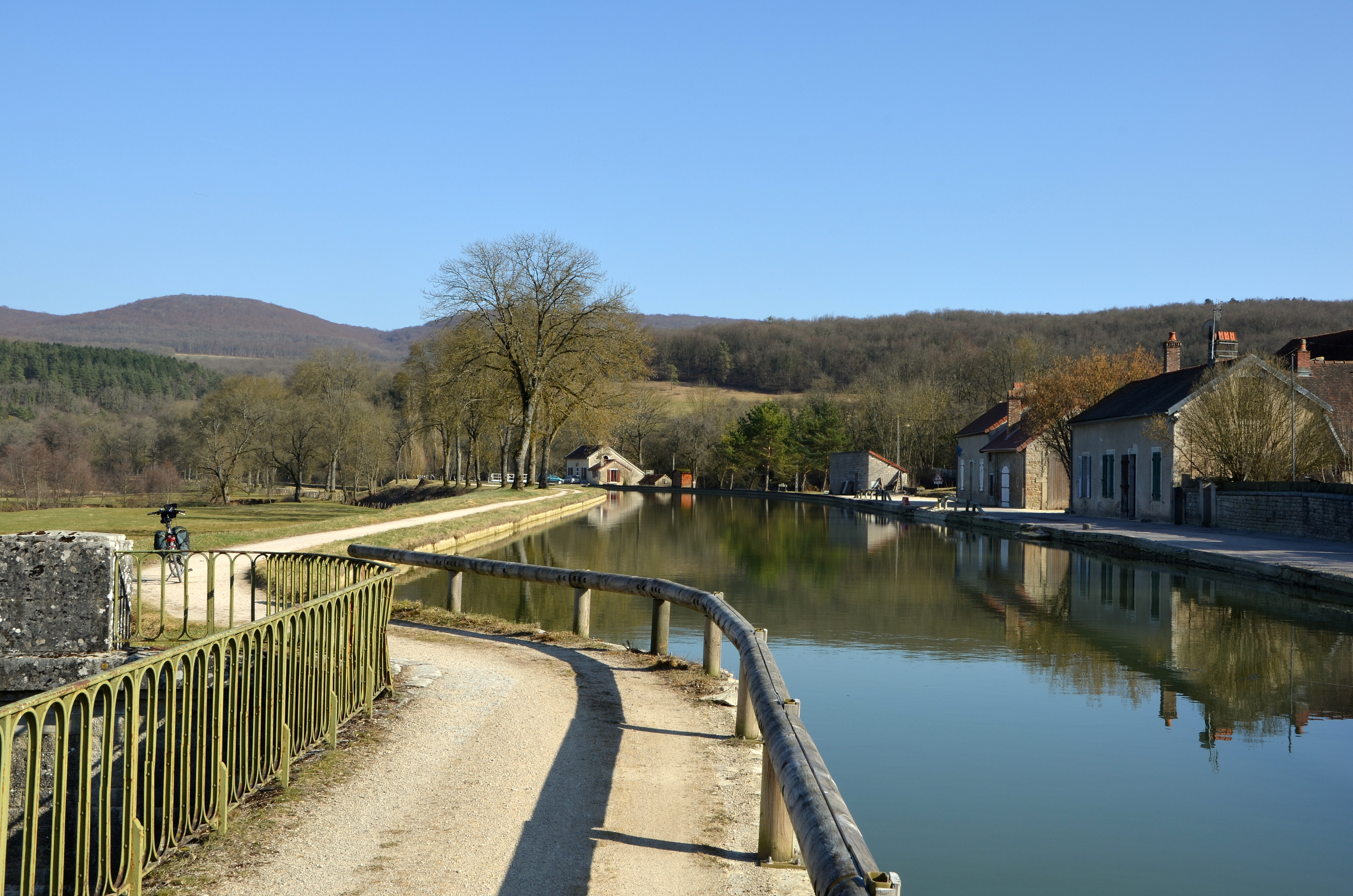 Canal de Bourgogne au Pont d'Ouche, Cote d'Or, Bourgogne, France